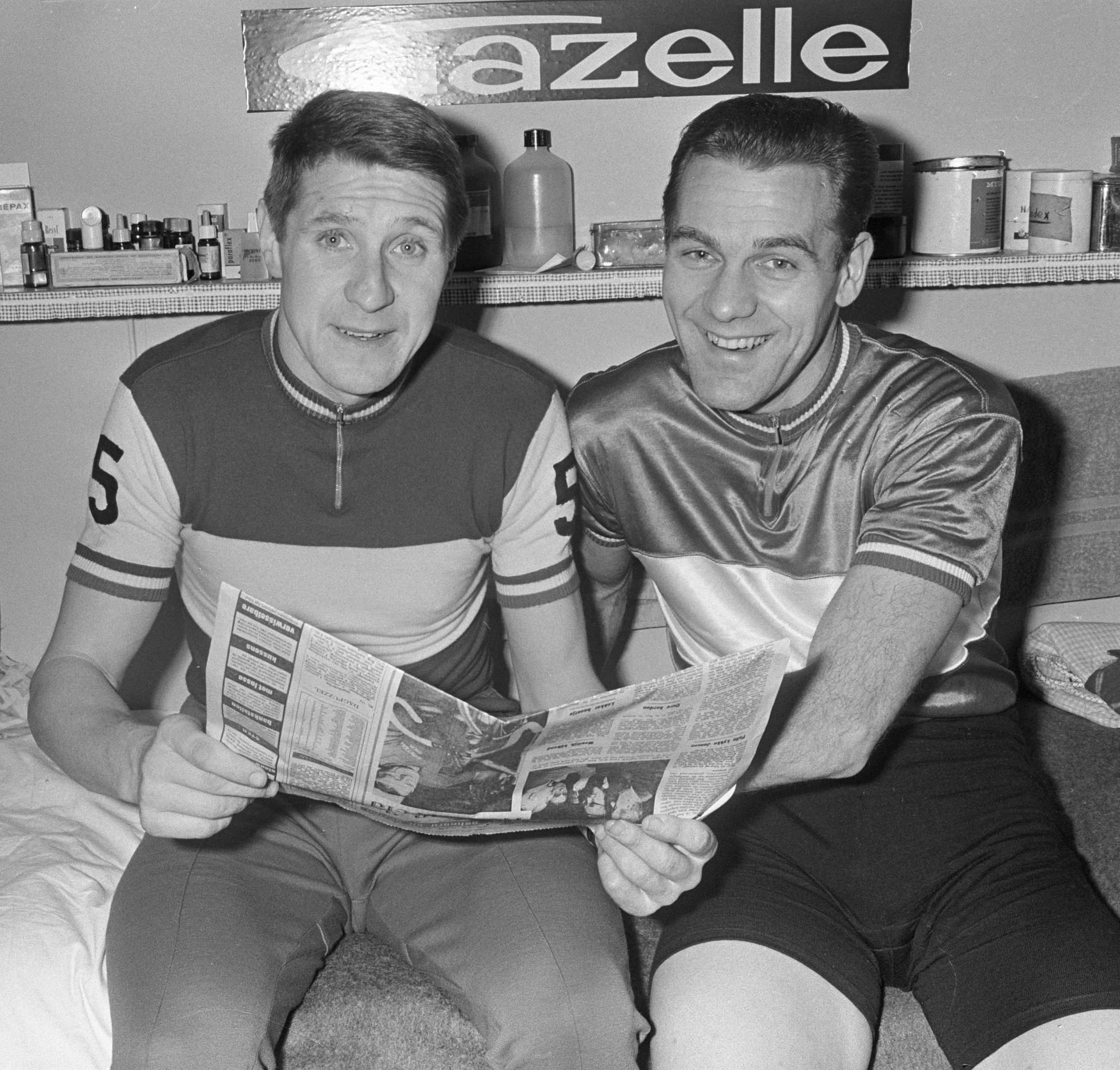 De zesdaagse, het leidende koppel Peter Post en Fritz Pfenninger (r)